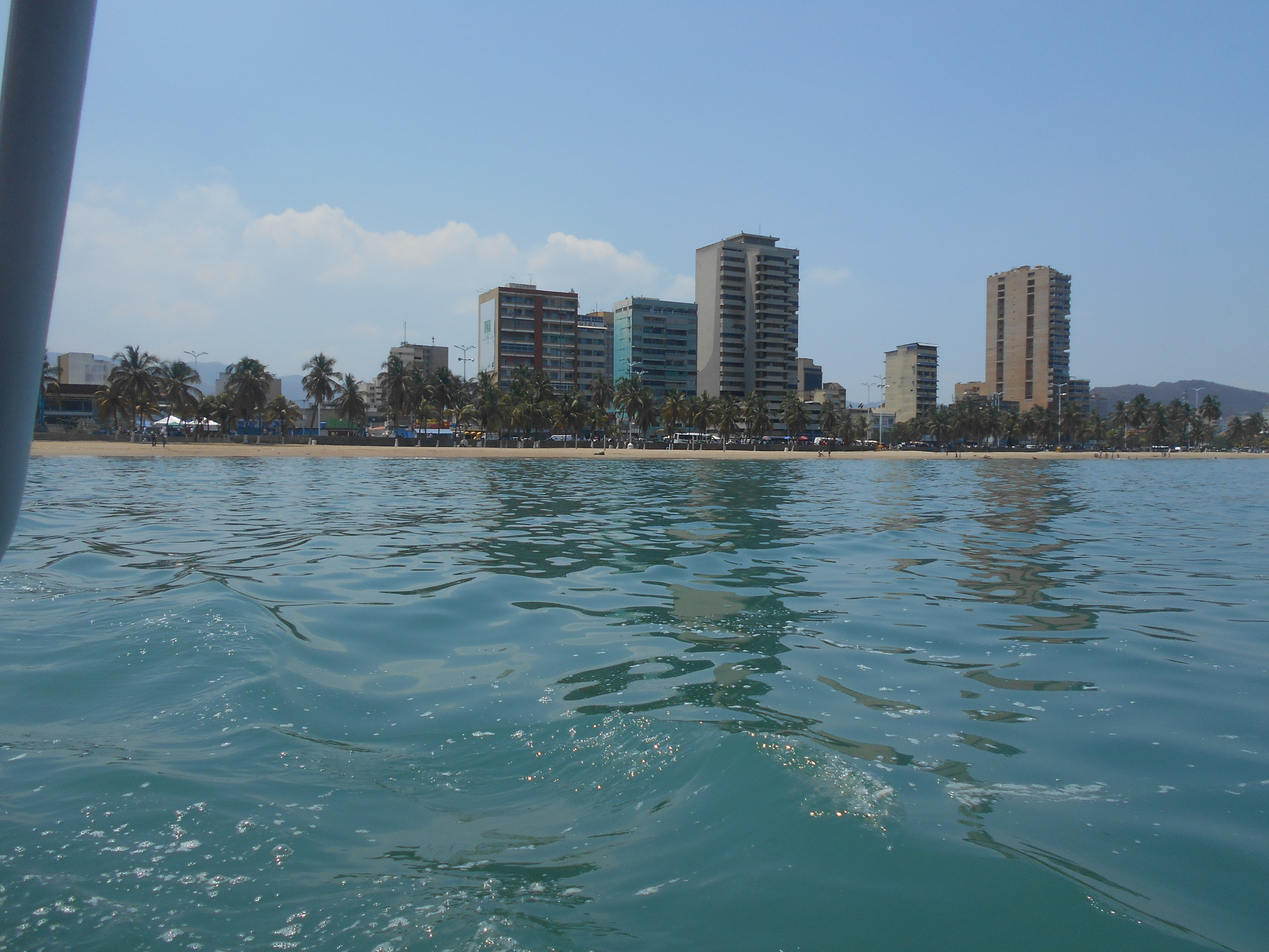 hermosa vista desde un bote, se puede apreciar el fasinante azul del mar y los edificios ...